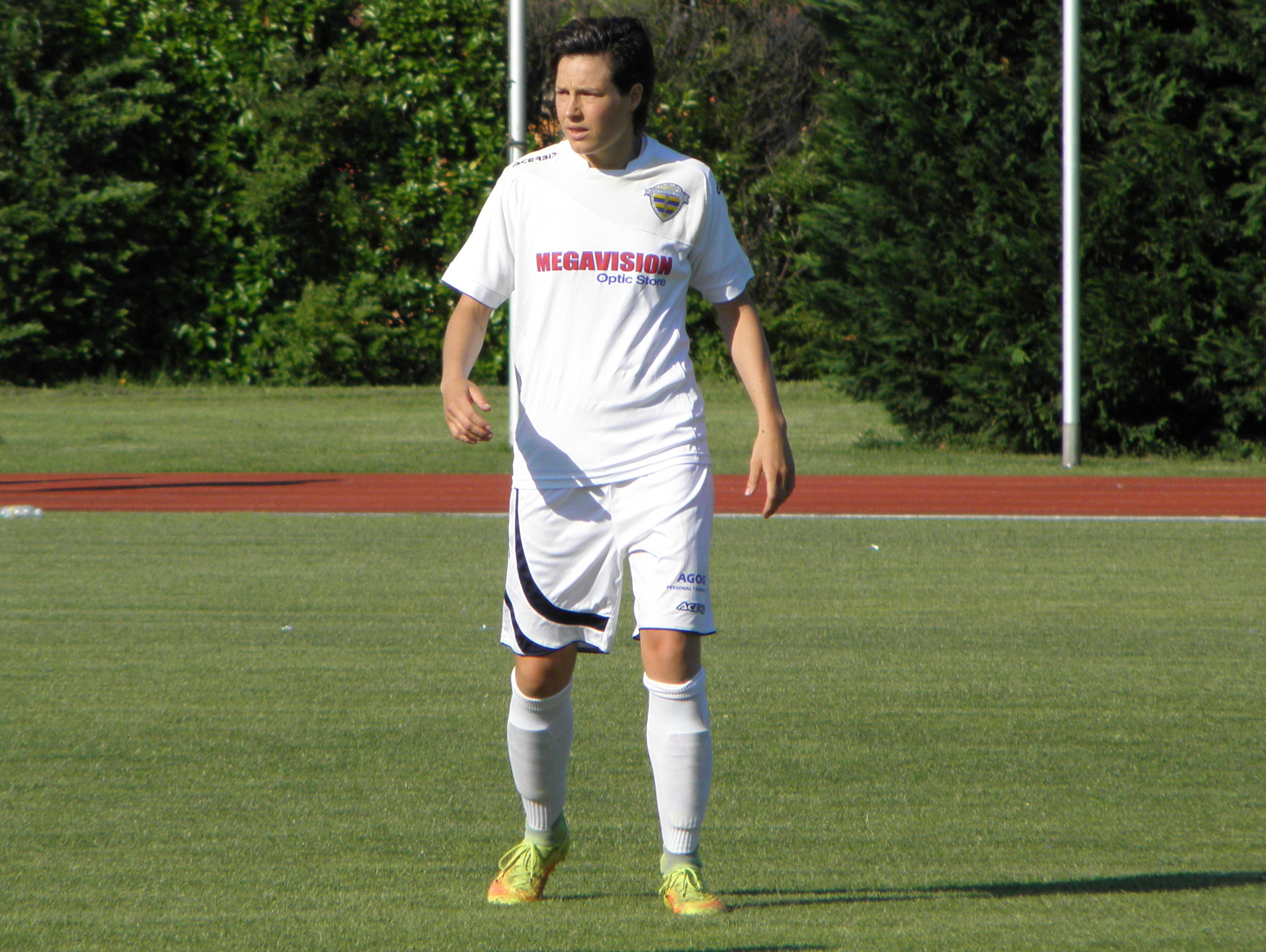 Abano Terme, Stadio delle Terme: 16 giugno 2018, spareggio UEFA Women's Champions League. Elisa Camporese durante una fase di gioco.